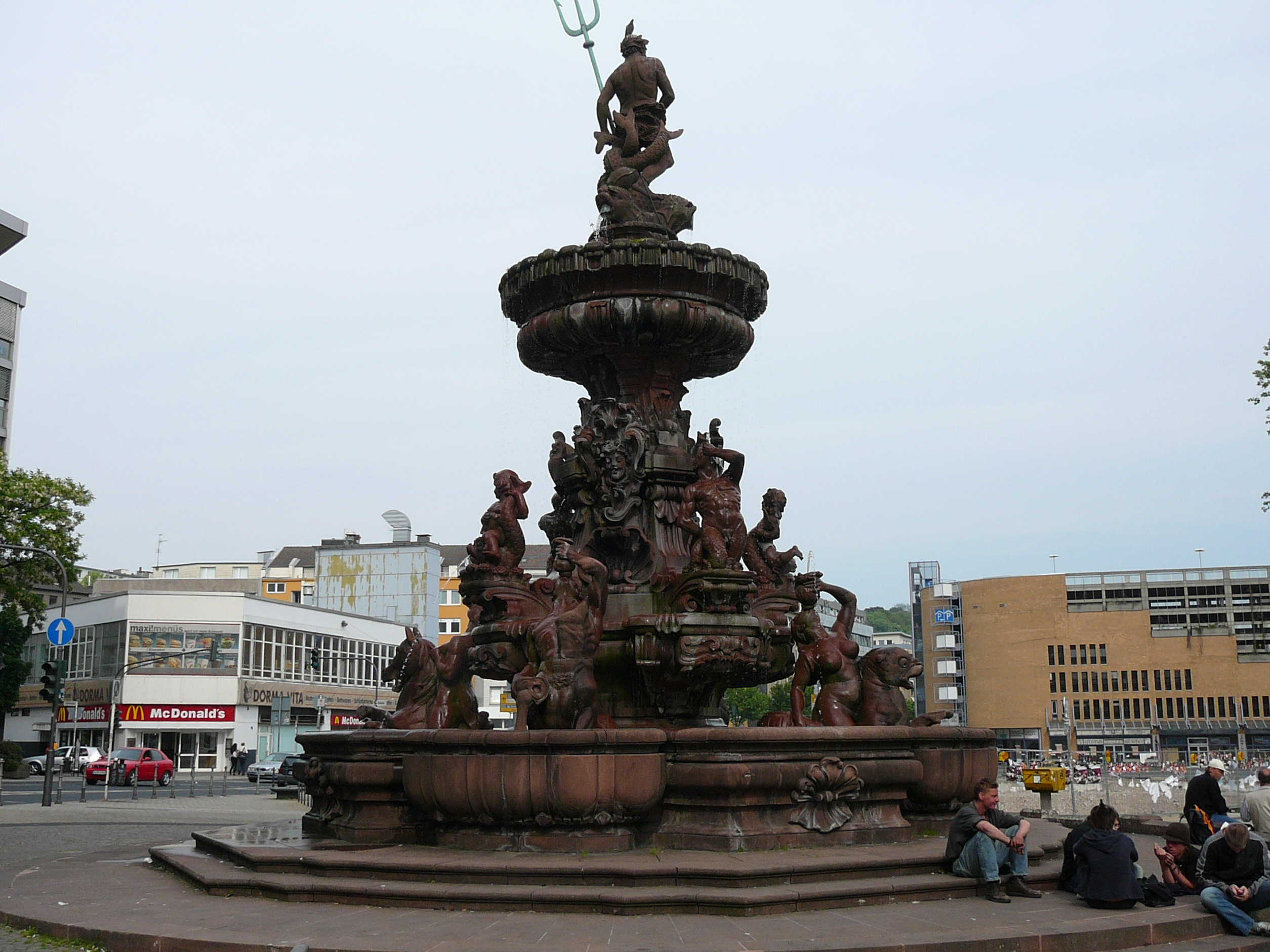 Jubliläumsbrunnen, Neumarkt, Wuppertal